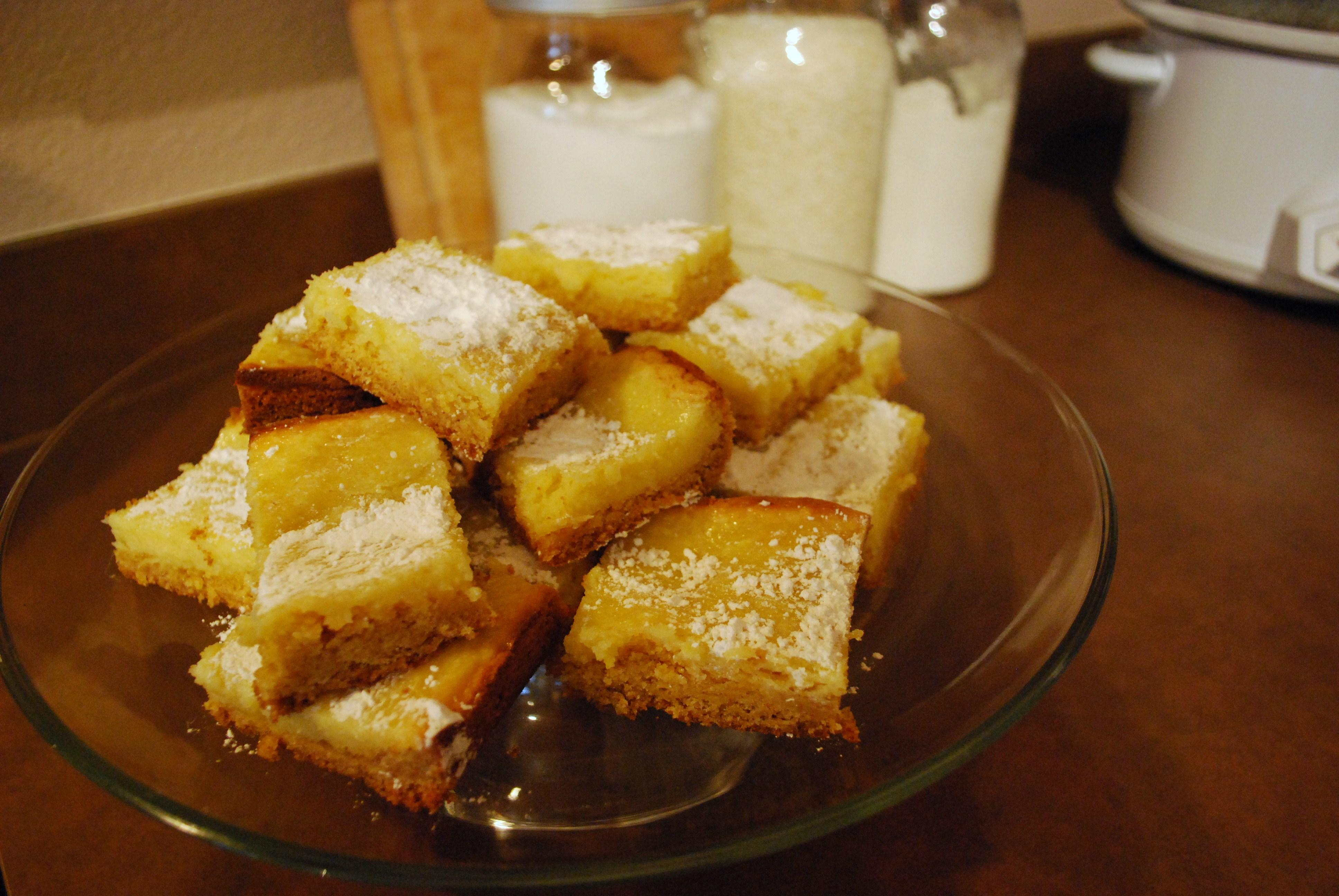 Yum!